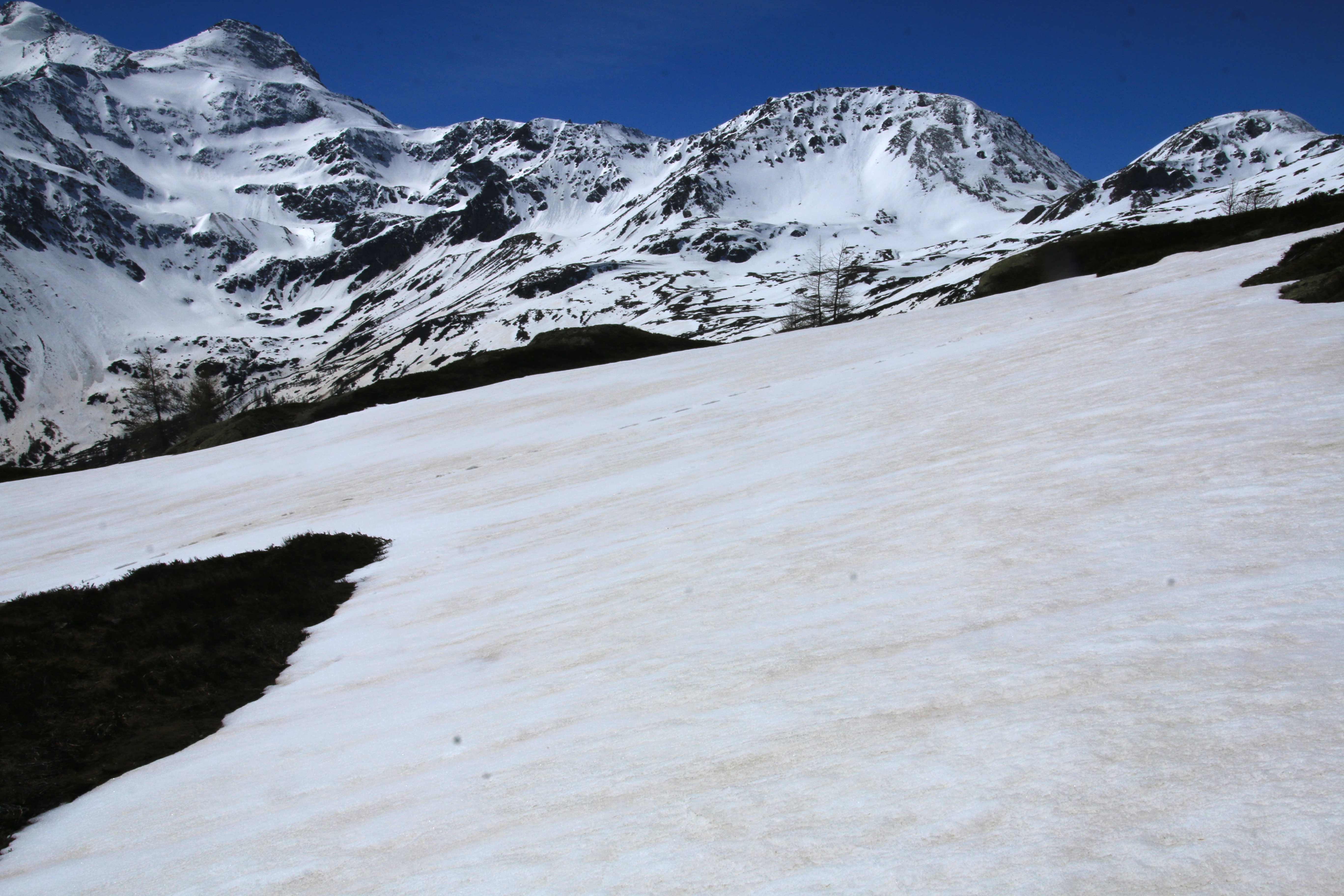 Sahara-Staubablagerung auf dem Schnee überhalb des Simplonpasses